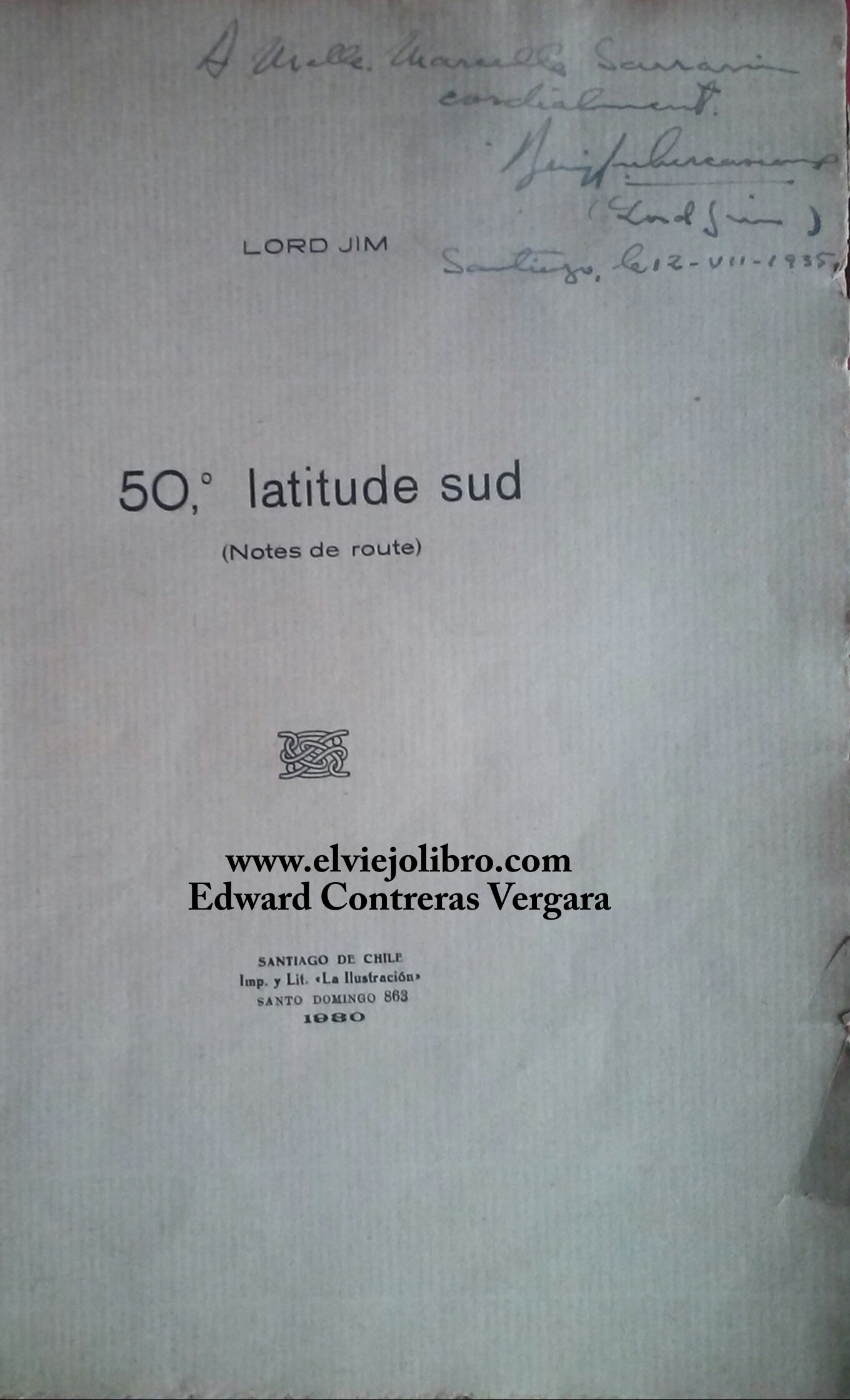 50° latitude sud, notes de route, por Benjamín Subercaseaux (Lord Jim). Primera edición, Santiago de Chile, imprenta y litografía La Ilustración, 1930, 55 páginas; con dedicatoria y firma del autor en 1935.